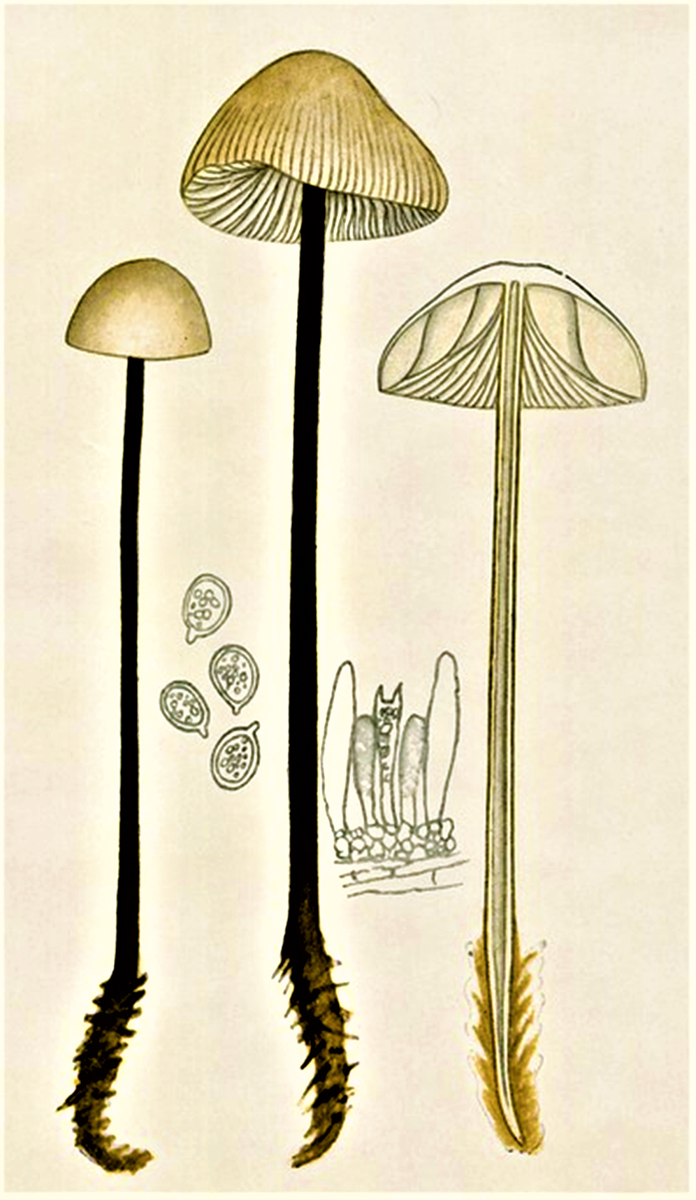 Giacomo Bresadola: Marasmius alliaceus (Jacq., 1762) Elias Magnus Fries (1838), heute Mycetinis alliaceus (Jacq.) Earle (1909)